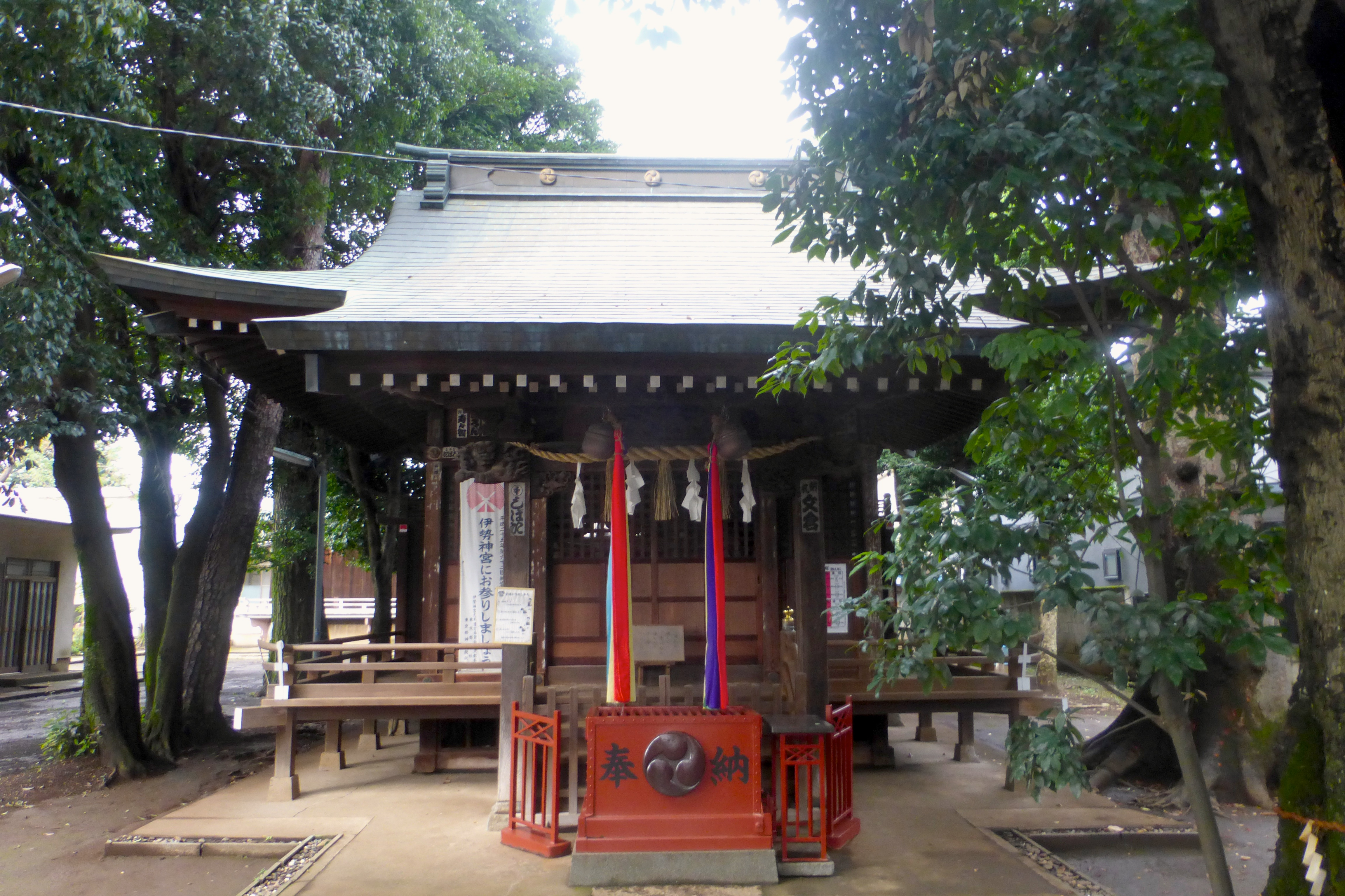 西高井戸松庵稲荷神社の拝殿